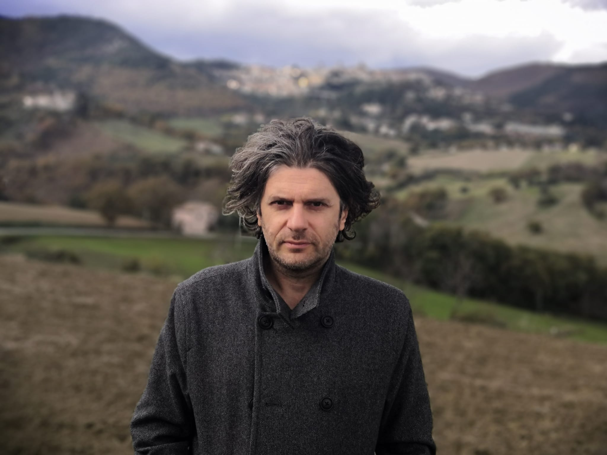 Simone Massi ritratto nelle colline marchigiane dove spesso ambienta le sue opere